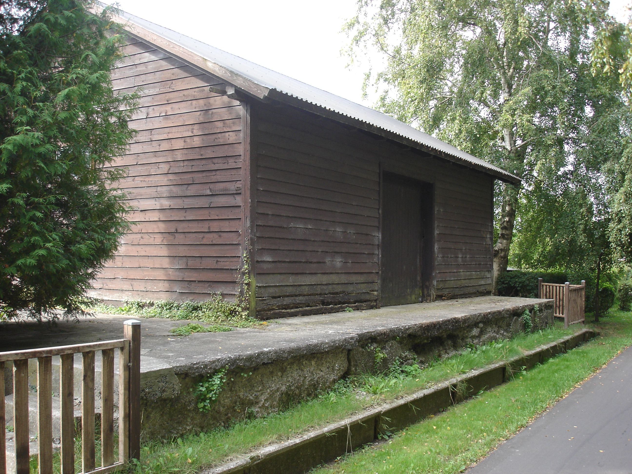 Veddum Stations varehus fra sporsiden